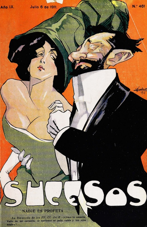 Sucesos